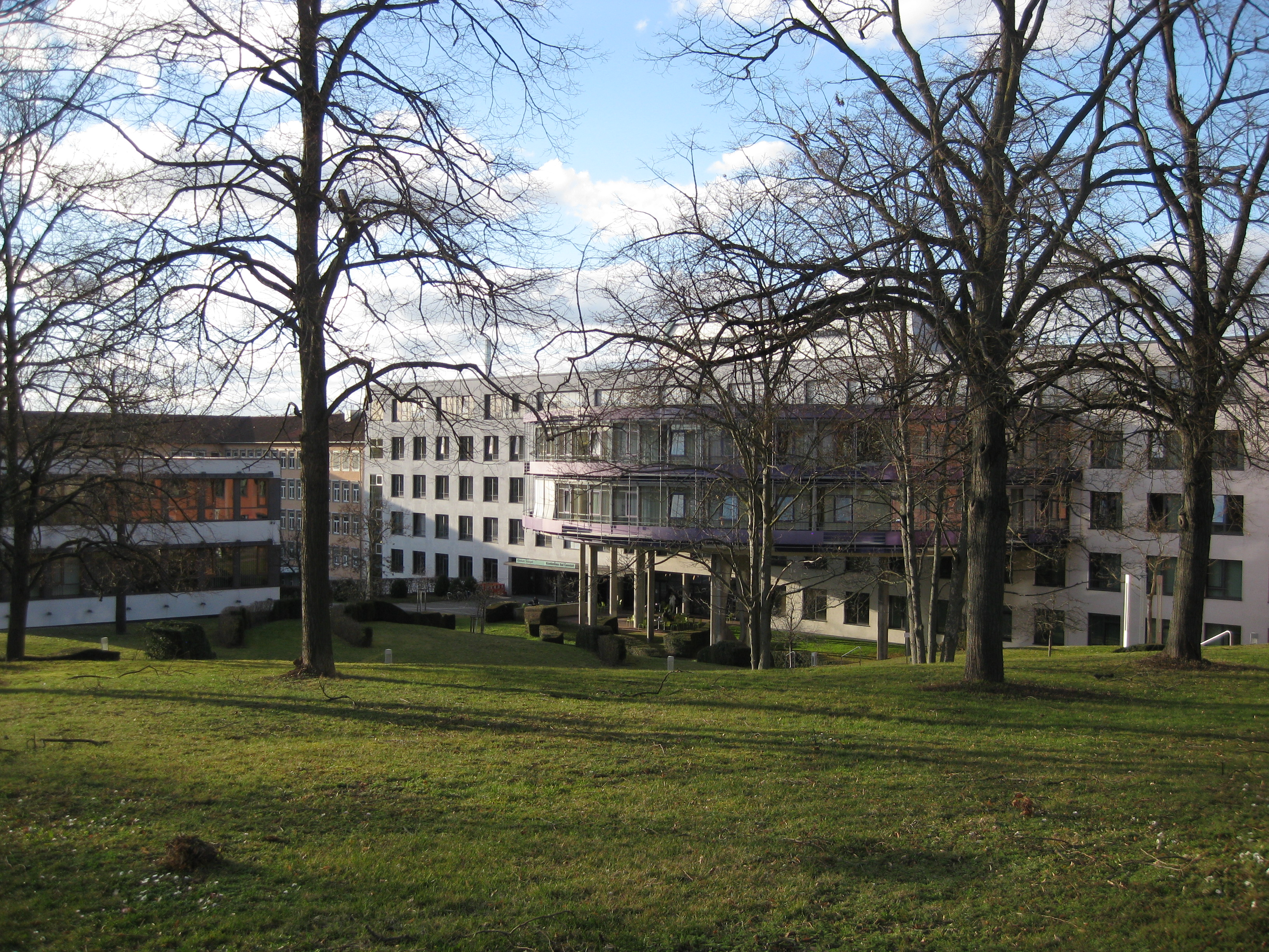 Krankenhaus Bad Cannstatt (Klinikum Stuttgart)